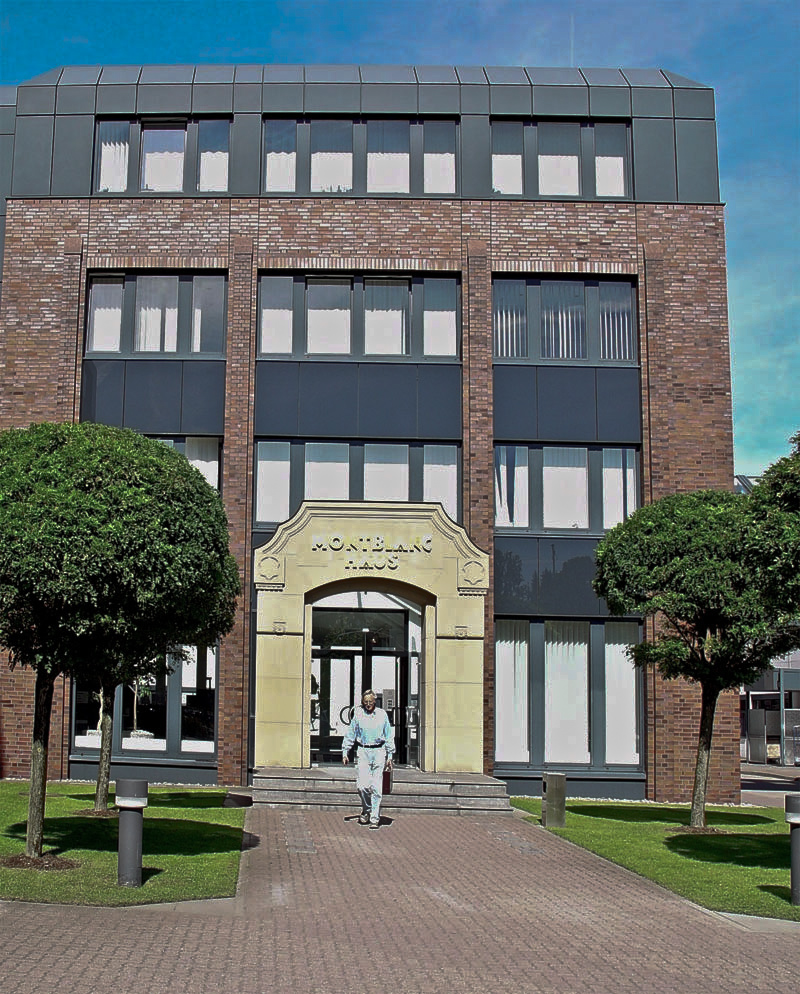 Montblanc Haupteingang Weitere Veröffentlichung außerhalb der Wikipedia: [1]